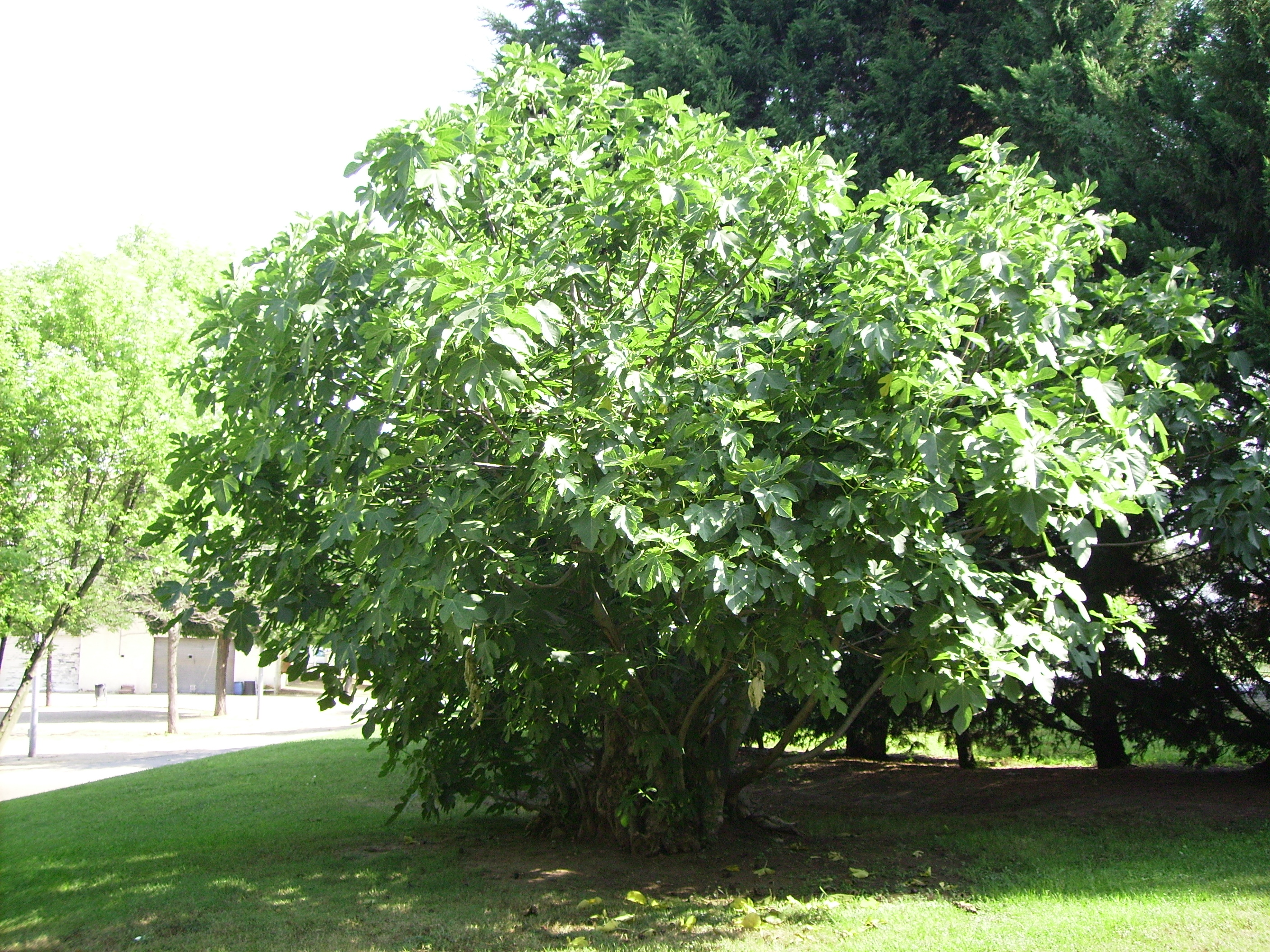 Figuera enmig d'un jardí on tothom les pot assolir